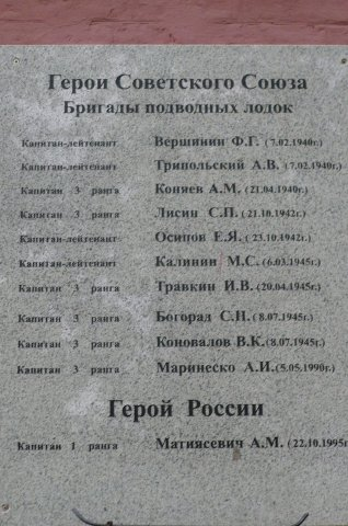 Маринеско в списке героев СССР